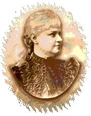 Arelia Castillo de Garrido (1842-1920) fue una escritora cubana fundó la Academia de Artes y Letras de Cuba